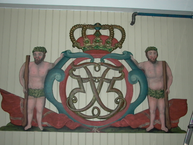 Frederik V's monogram fra Beiarn gamle kirke, henger i våpenhuset i Beiarn kirke